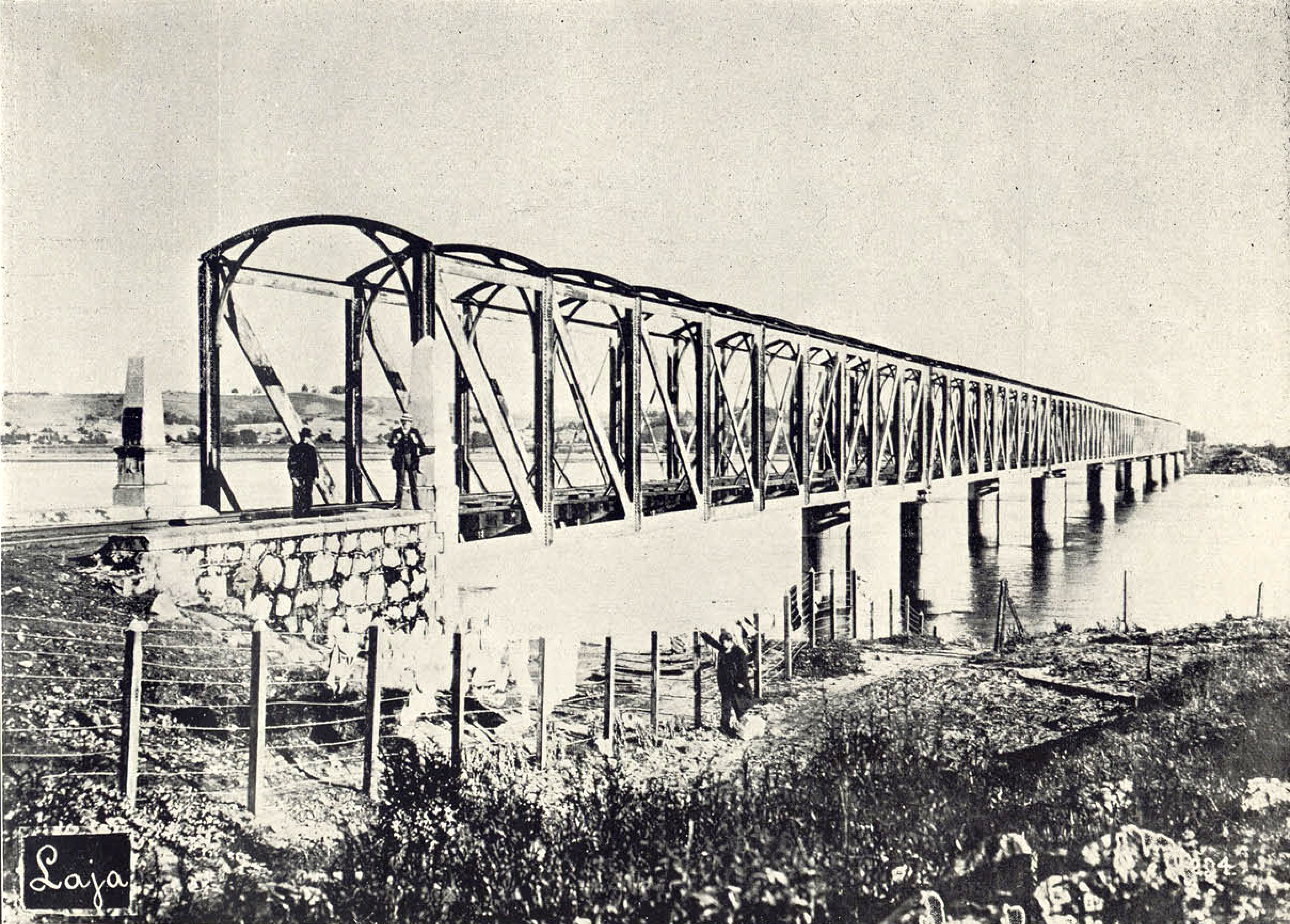 Fotografía tomada ca. 1909 del puente ferroviario sobre el río Laja, proyectado por Enrique Budge Prats y construido por Lever, Murphy y Cía, en 1890.